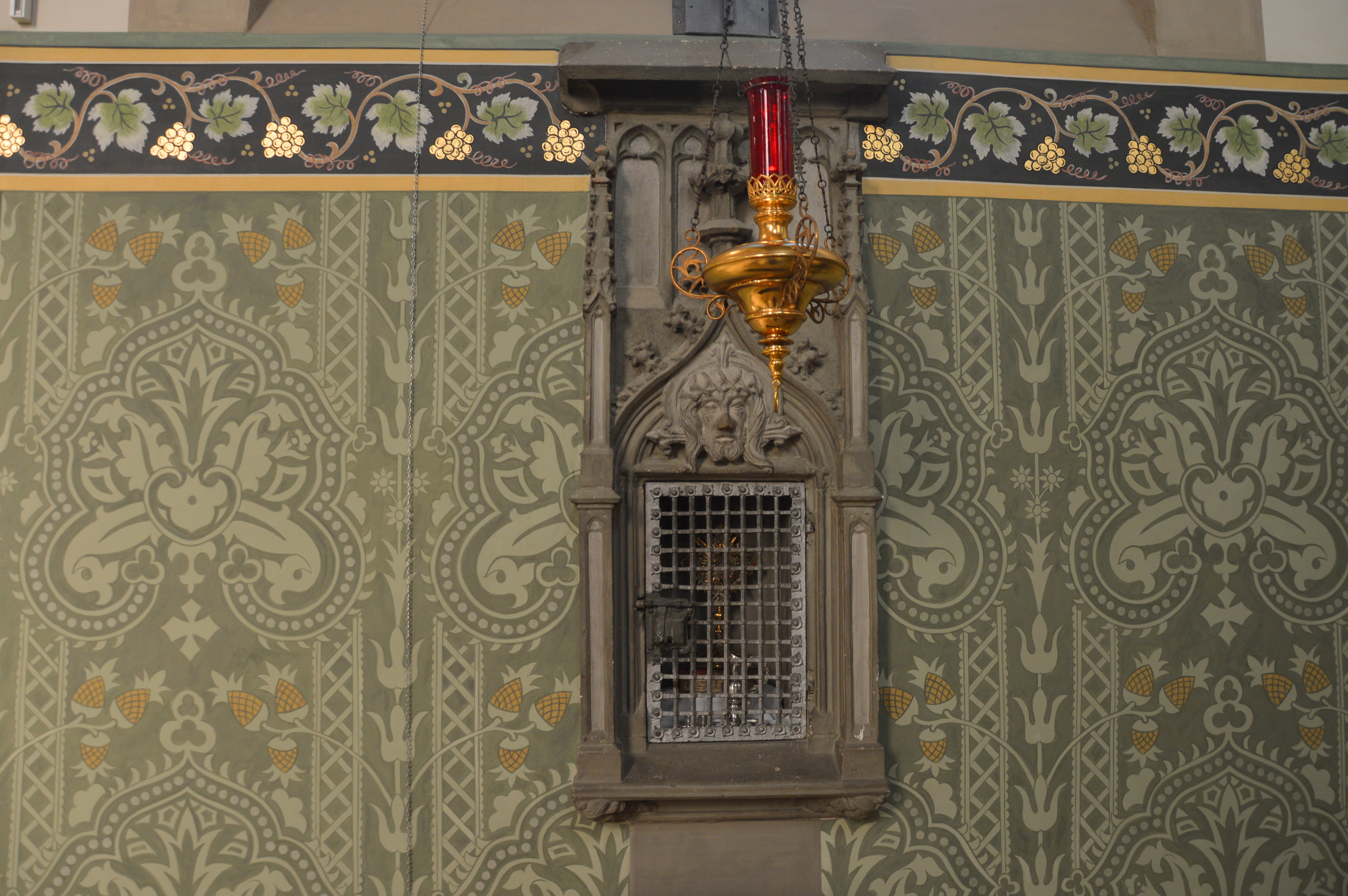 Sakramentenschrein Katholische Pfarrkirche St. Matthäus Bad Sobernheim